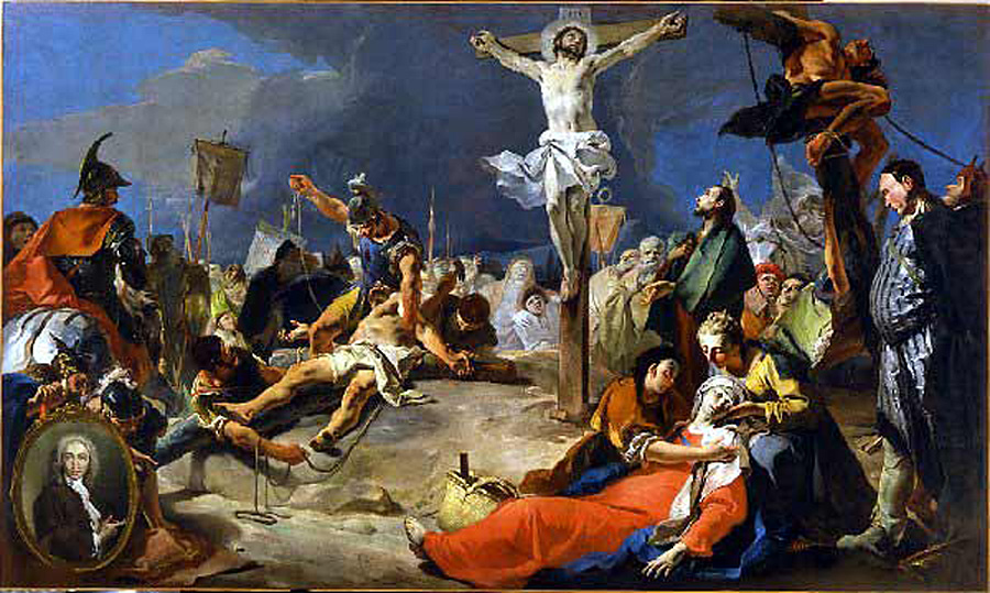 Giovanni Battista Tiepolo - Crocifissione - Chiesa San Martino - Burano (Venezia)